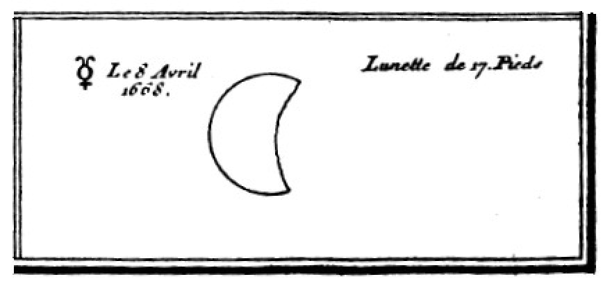 Dessin de Mercure, d'après Picard.